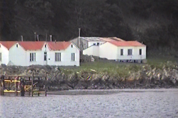 Estancia Remolino, frente al canal Beagle. Provincia de Tierra del Fuego, Antártida e Islas del Atlántico Sur, Argentina.